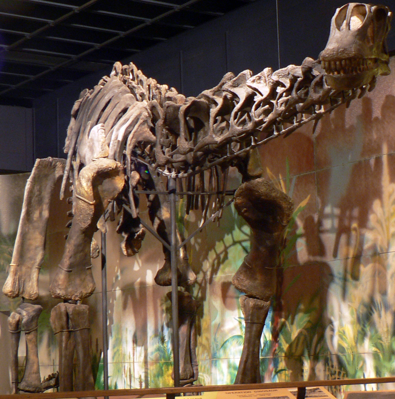 Haplocanthosaurus delfsi skeleton